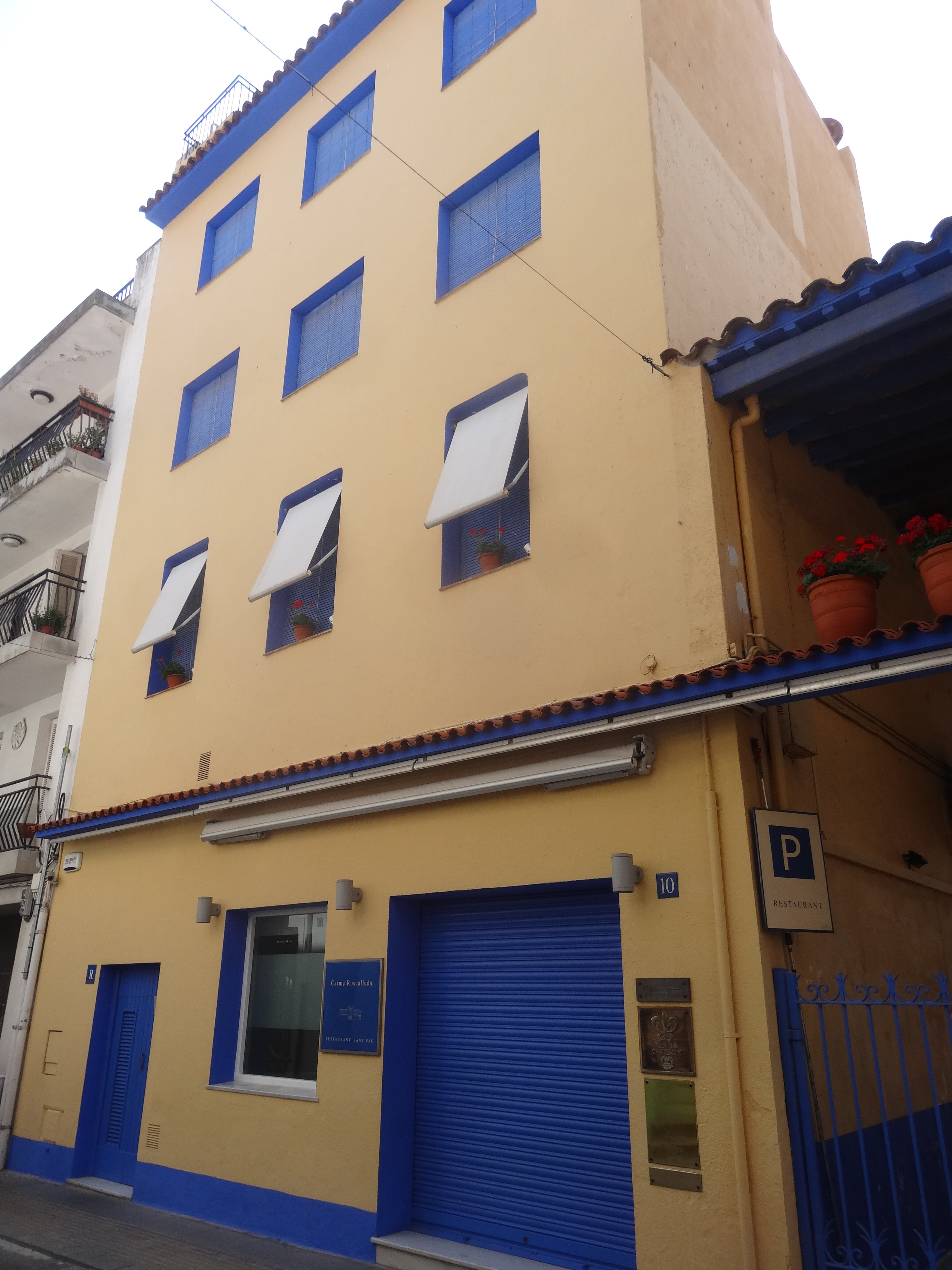 Restaurant Sant Pau (Sant Pol de Mar, Maresme).